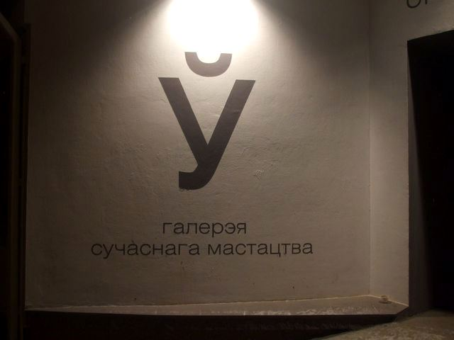 Галерэя сучаснага мастацтва ў Мінску. Праспрект Незалежнасці, 37 А